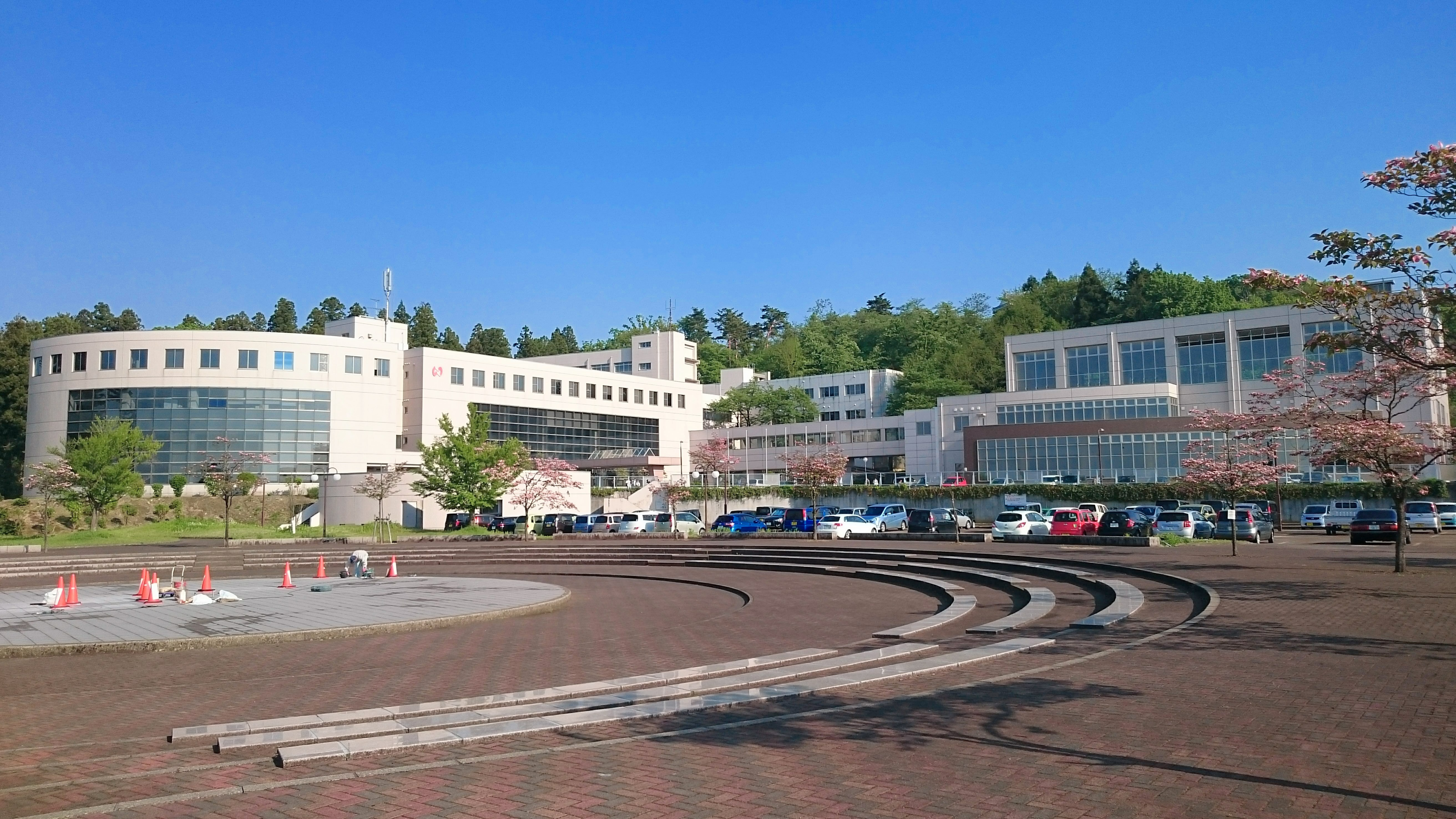 長岡大学の全景